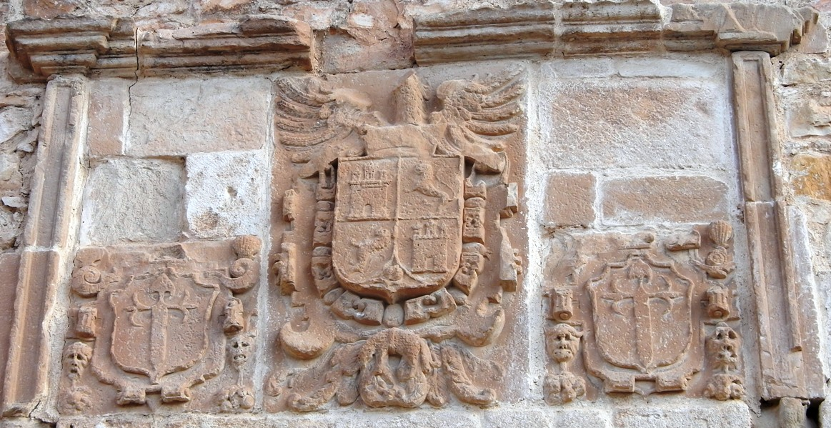 Escudos sobre la puerta del Pósito.